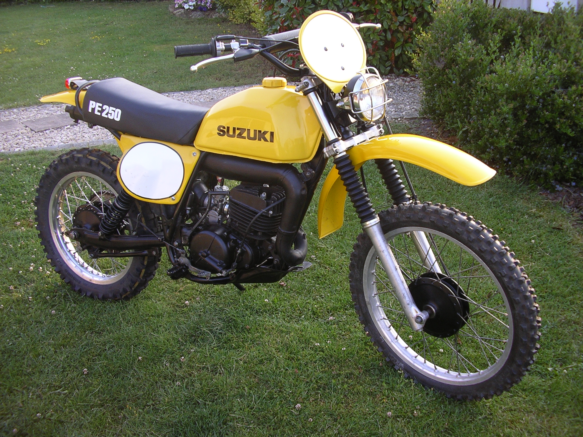 1977 SUZUKI PE250 B